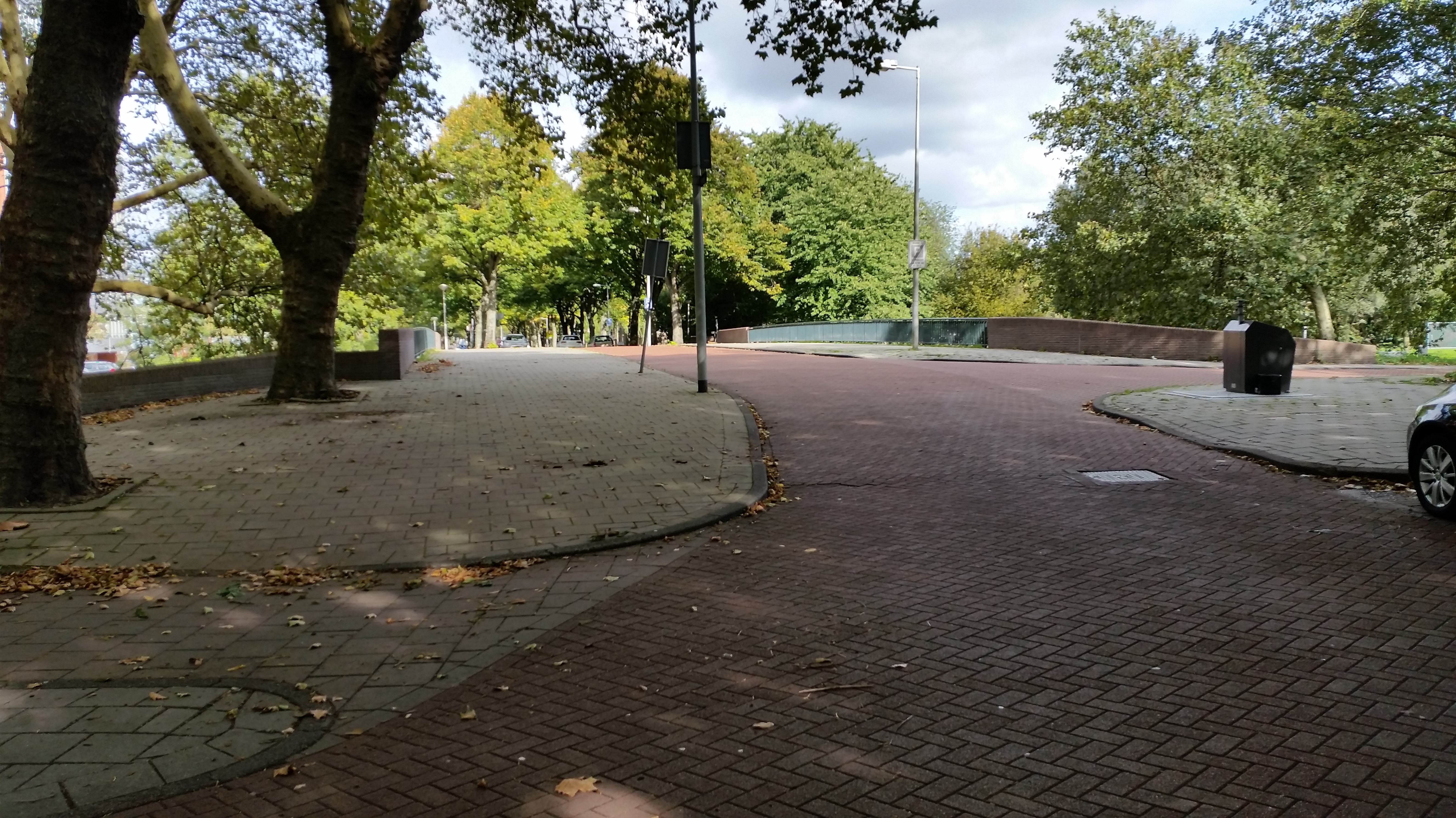 Brug 611, Tineke Guilonardbrug, overzicht